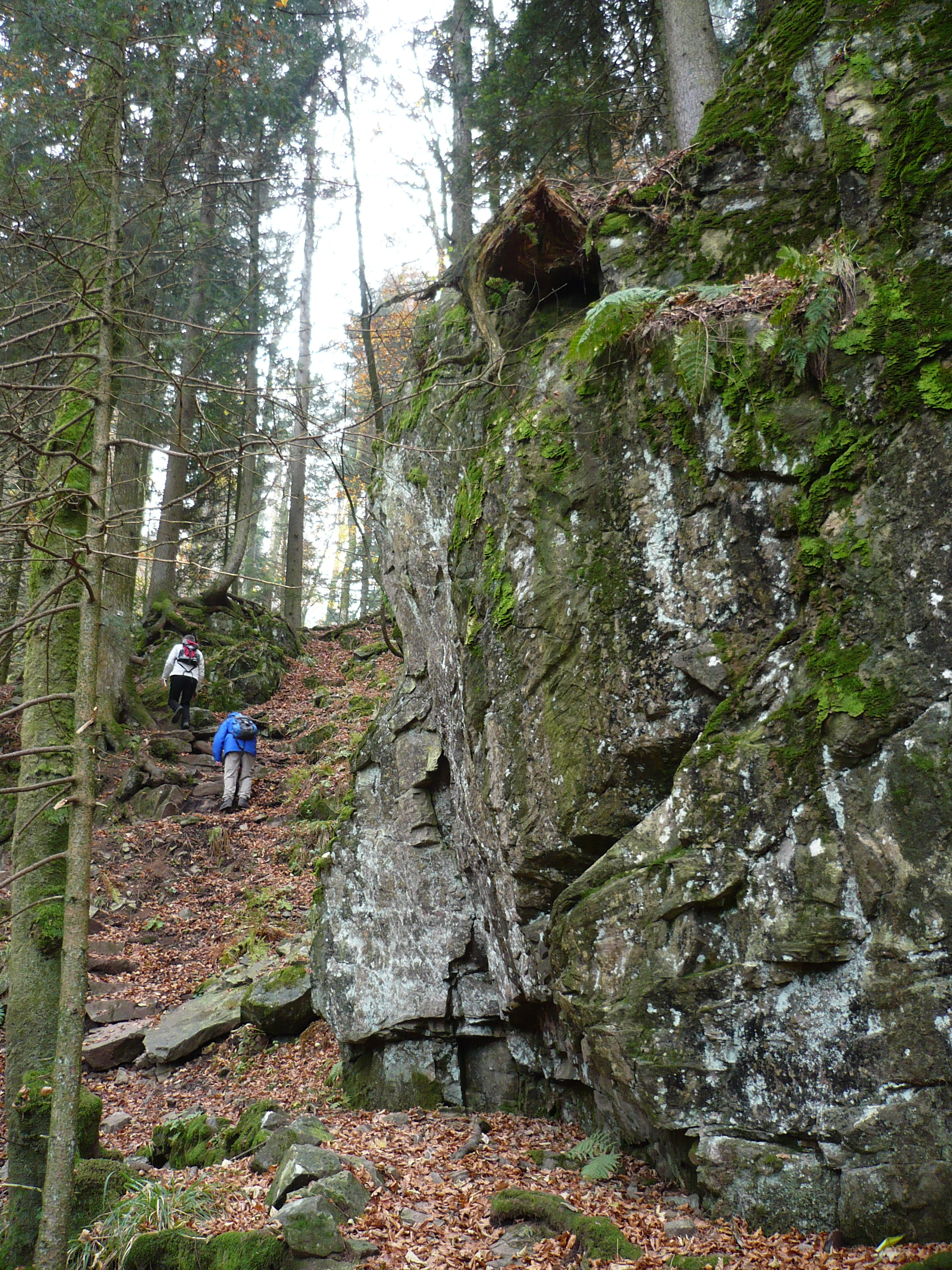 Felsen bei den Hirschbachfällen